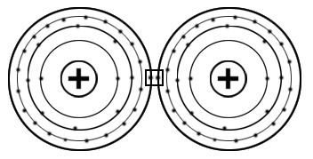 ഇലക്ട്രോണുകൾ കണത്തിൽ